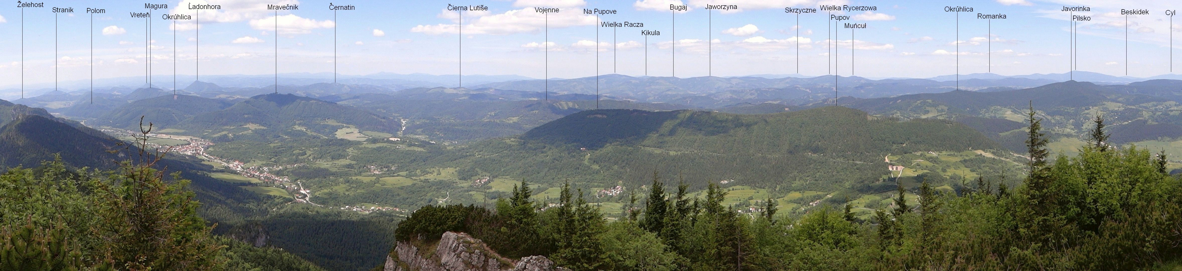 View from Malý Rozsutec